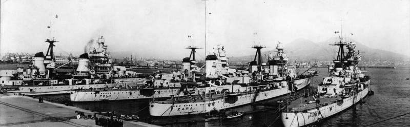 Golf von Neapel, Italienische Kreuzer Fast die gesamte italienische Flotte im Golf von Neapel zusammengezogen. Im Golf von Neapel werden jetzt die Einheiten der italienischen Kriegsflotte zu der grossen Parade zusammengezogen, die der Führer während seines Besuches in Italien abnehmen wird. Auf unserem Bild sieht man die drei schweren Kreuzer (10.000 Tonnen) "Fiume", "Zara" und "Pola". Scherl Bilderdienst, 19.4.38